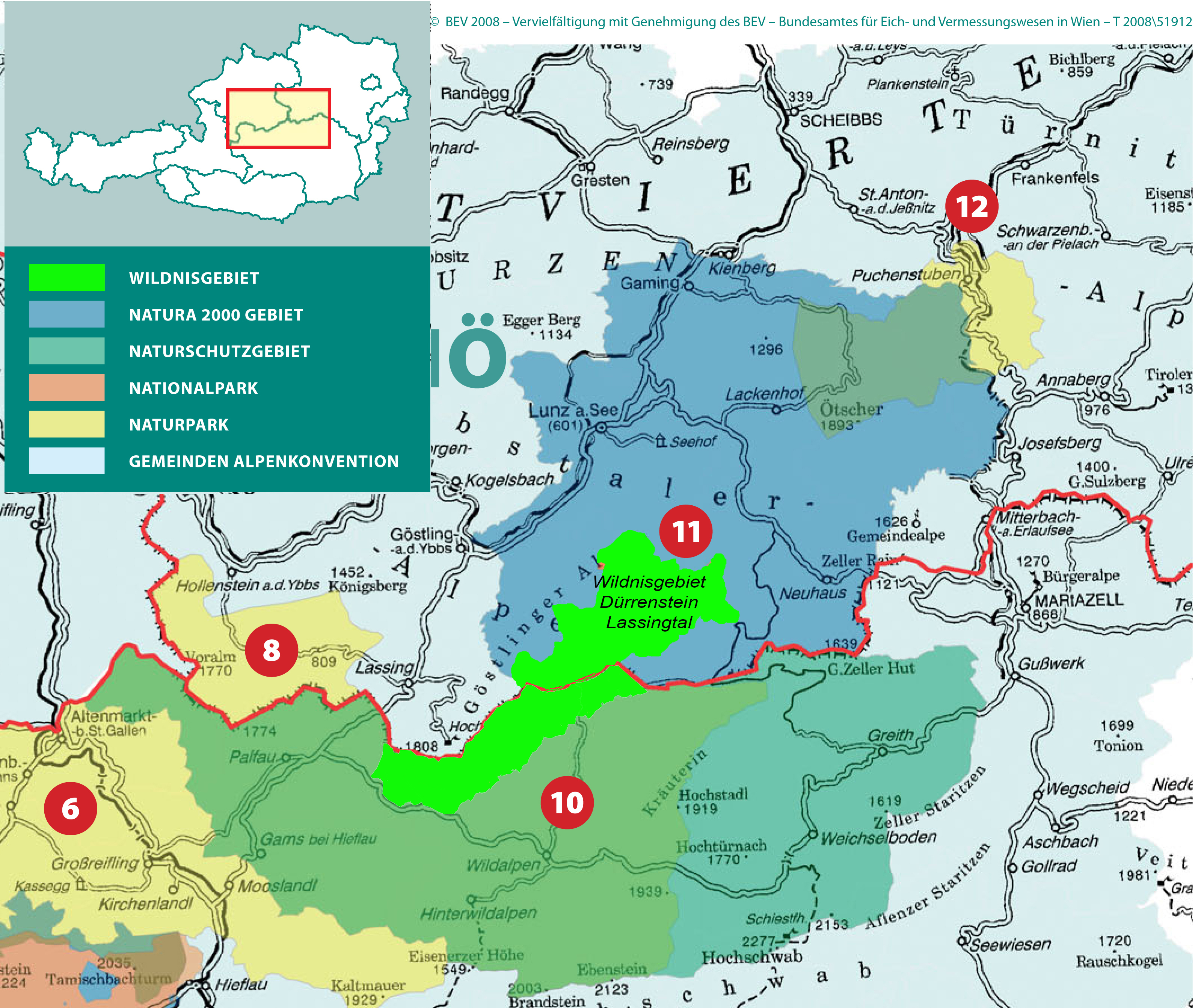 Wildnisgebiet Duerrenstein Lassingtal - Pufferzonen